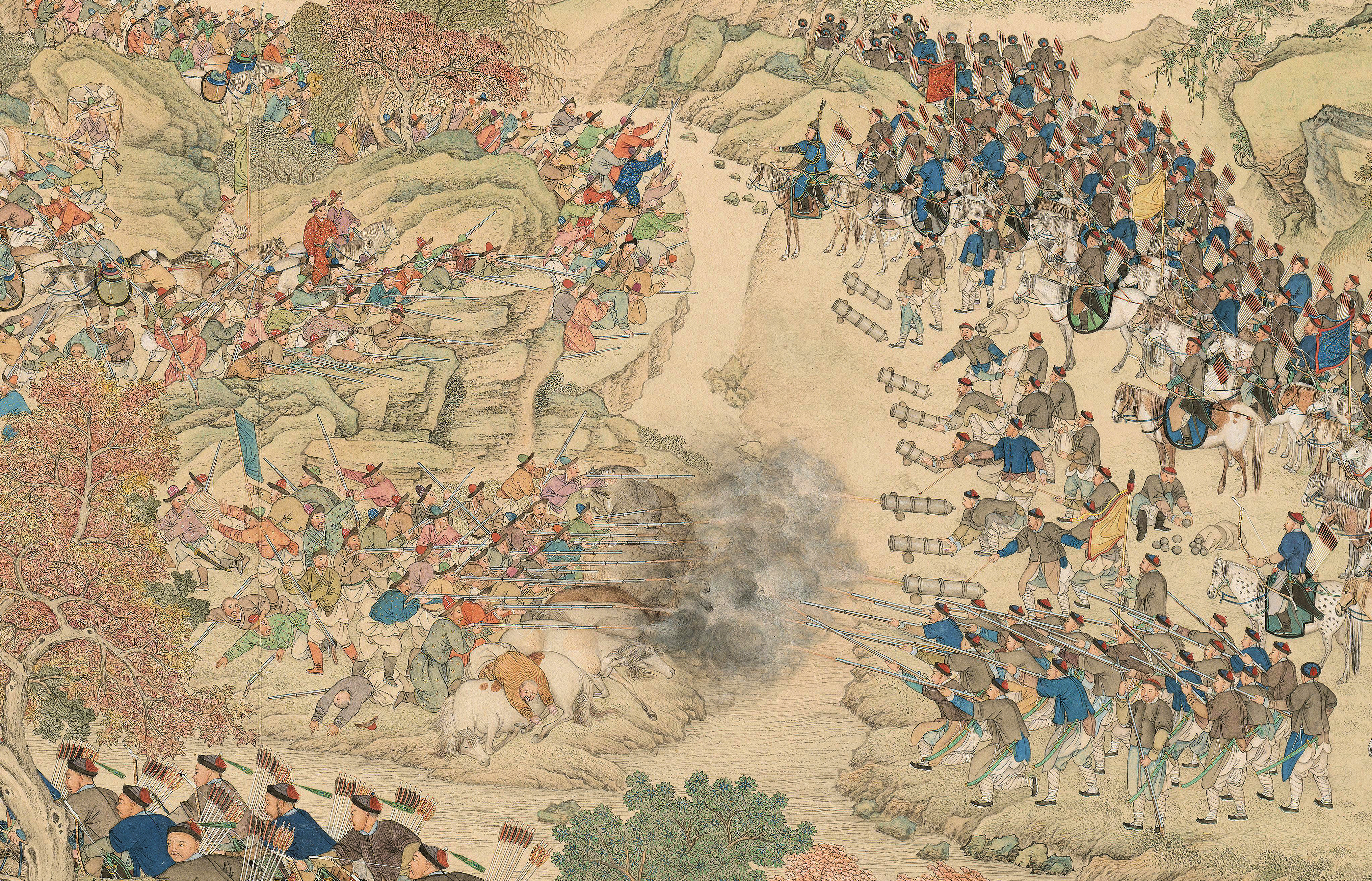 Это сражение с цинских войск с уйгурами у озера Ешилькуль в 1759 г.